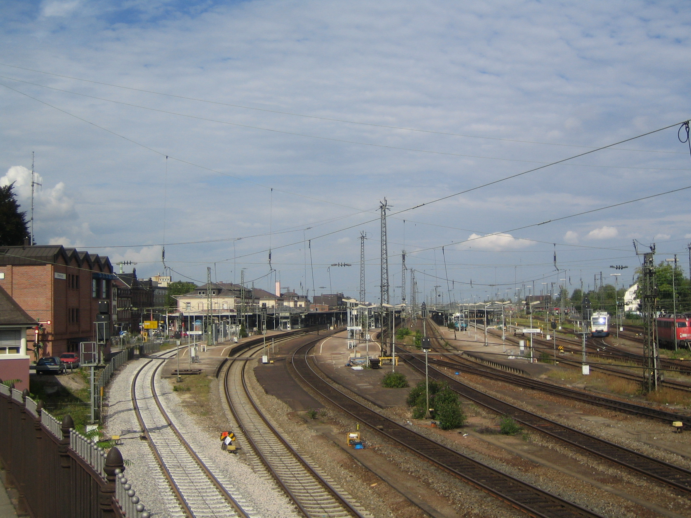 Bahnhof von Offenburg, selbst fotografiert